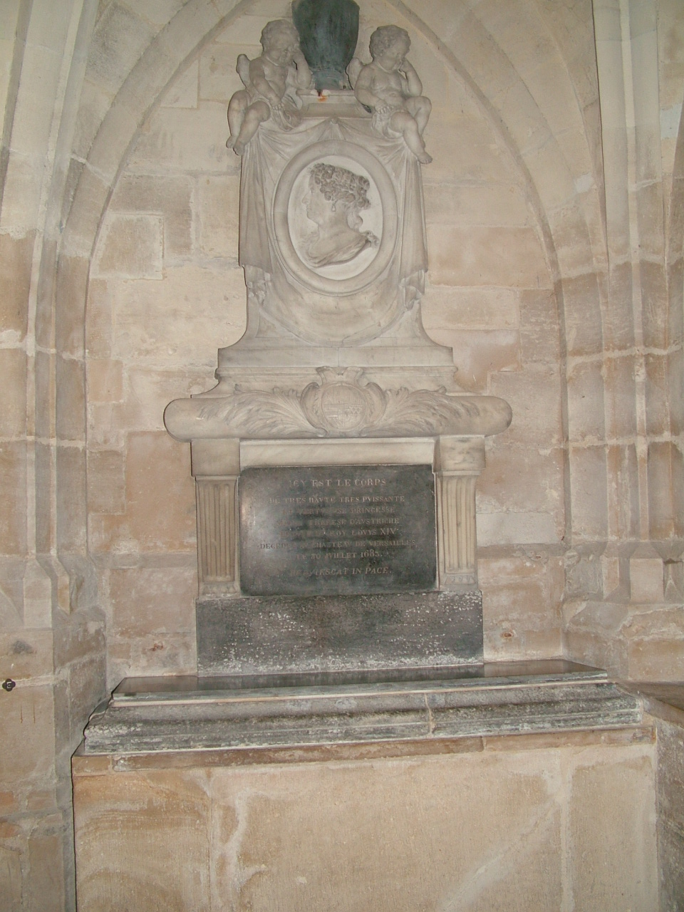 Gedenktafel für Königin Marie Therese von Frankreich (ehemalige Infantin Maria Teresa von Spanien) in Saint-Denis